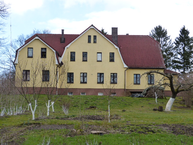 Arnhausen, ehemaliges Gutshaus